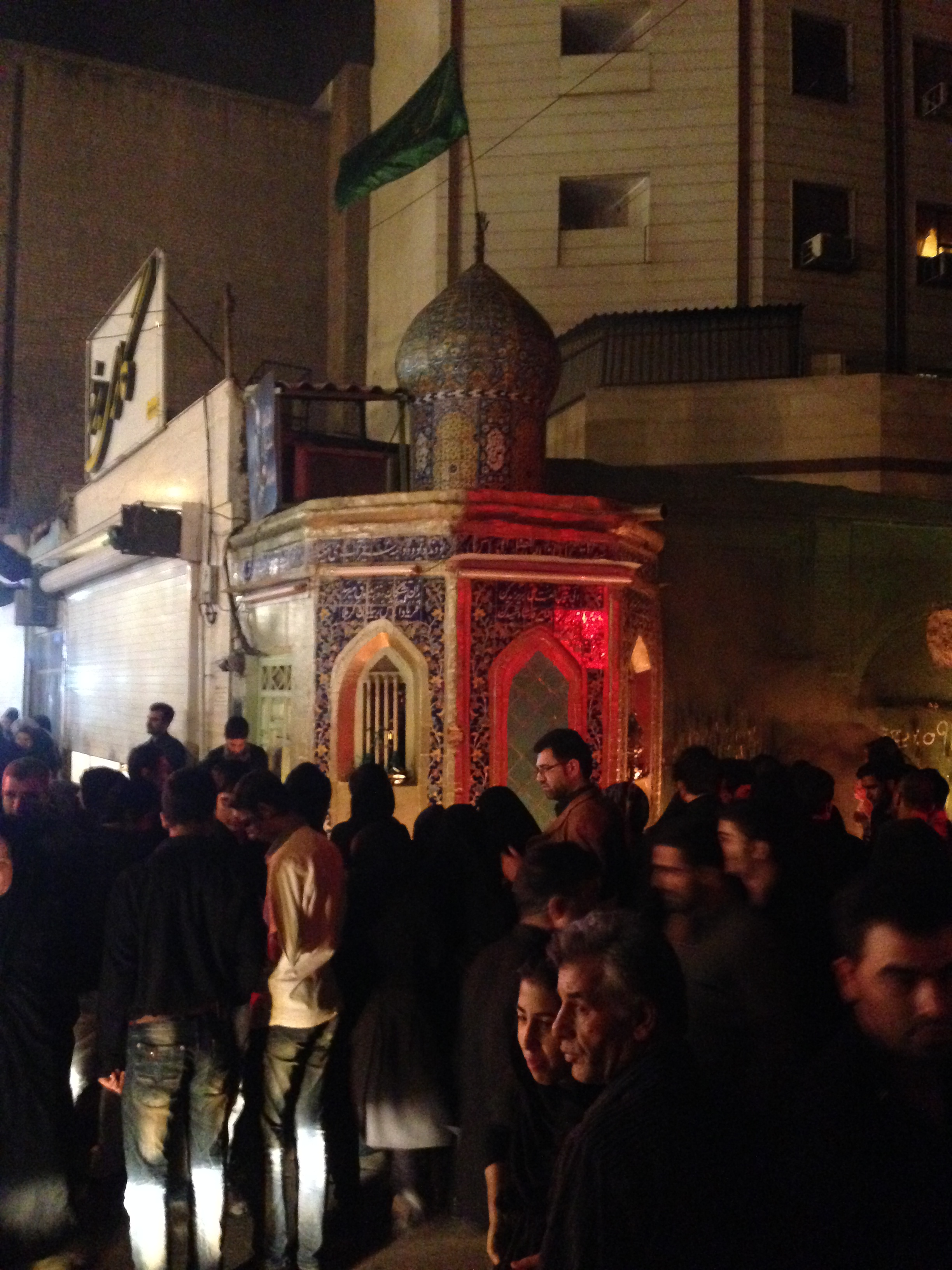 مراسم شام غریبان پیرامون سقاخانه اهواز